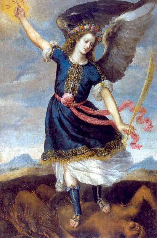 La obra representa a San Miguel Arcángel derrotando a Satanás, y se conserva en el monasterio de las Descalzas Reales de Madrid.